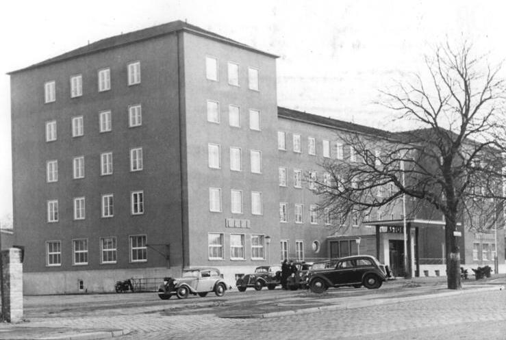 Dresden, Hotel „Astoria“ Illus Elbebild 9.2.51 Dresden erhielt eines der schönsten Hotels in Deutschland. Eines der schönsten Hotels in Deutschland wurde in Dresden aus den Ruinen eines ehemaligen Verwaltungsgebäudes erbaut und von den „Deutschen Werkstätten“ neu eingerichtet. Geschmackvolle möbilierte Einbettzimmer mit fliessendem kalten und warmen Wasser, Café, Speisesaal und Gästezimmer bietet das Hotel „Astoria“ seinen Gästen zu relativ niedrigen Preisen. Noch in diesem Jahr soll die Bettenzahl um 25 bis 30 Prozent gesenkt werden. UBz: Gesamtansicht des Hotels „Astoria“ in Dresden.